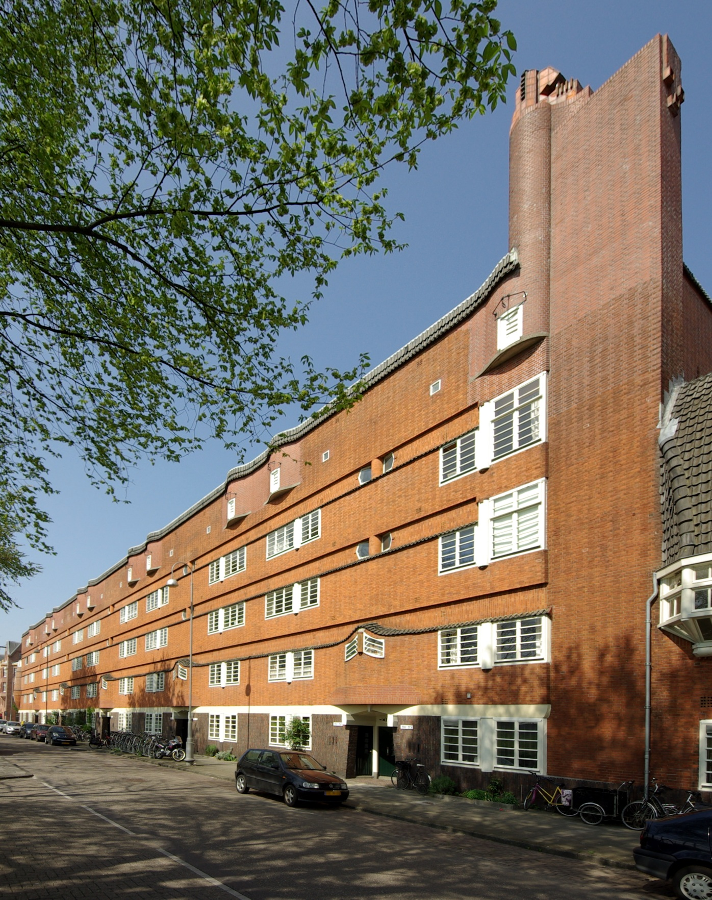 Gebouw Het Schip in Amsterdam 8″ N, 4° 52′ 27.06″ E